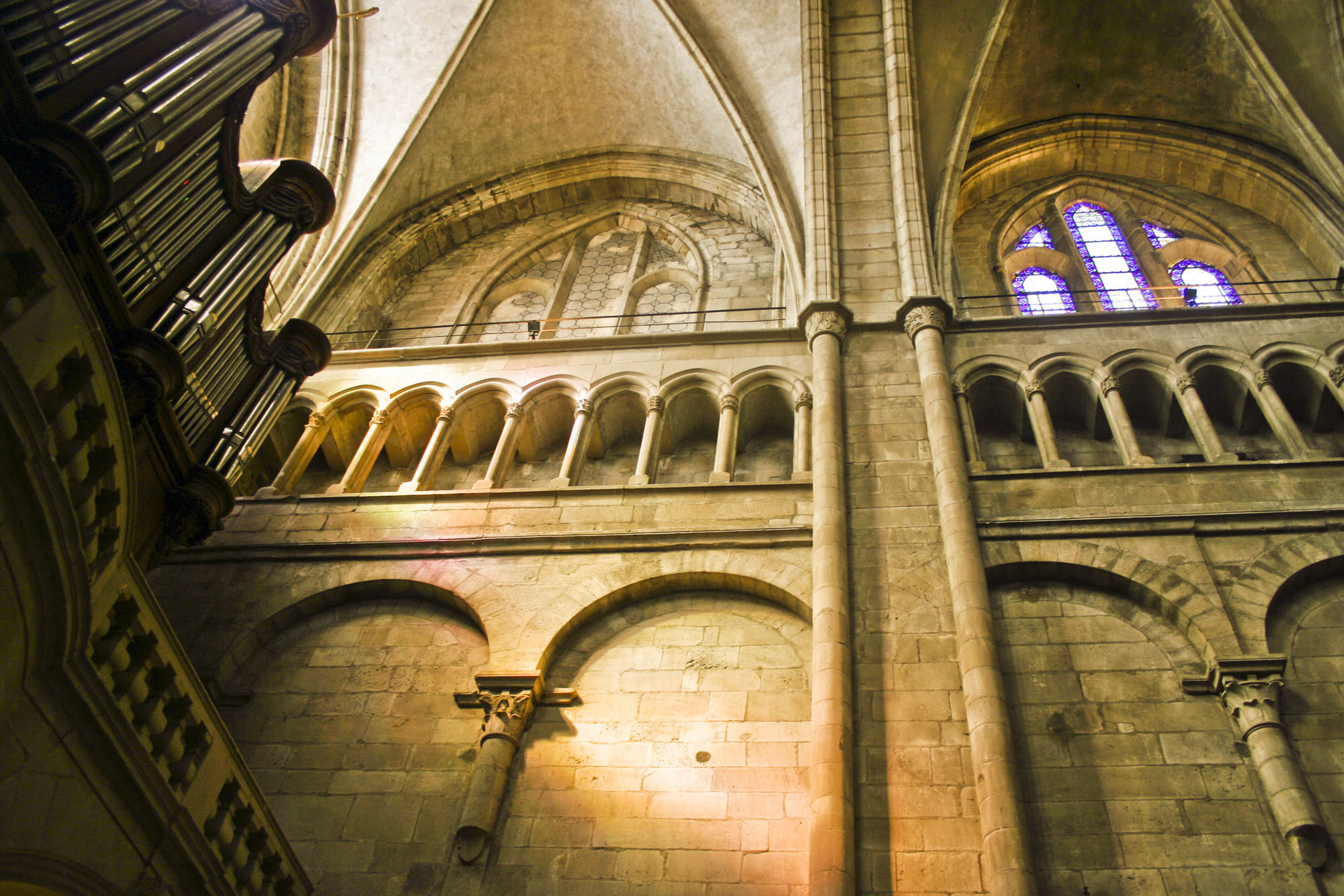 Collégiale saint-Barnard de Romans-sur-Isère (Drôme), vue de la nef, première travée